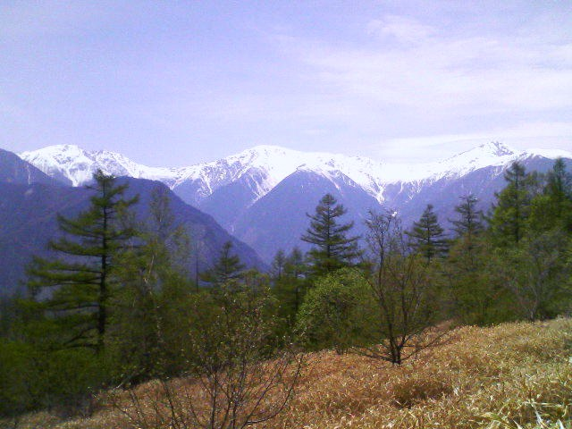 夜叉神峠からの白峰三山